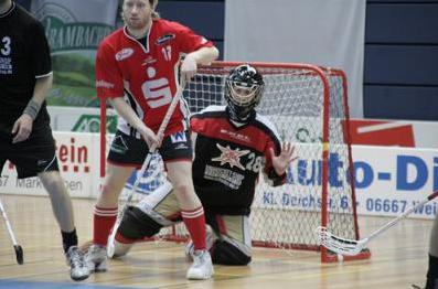 Felix Klein während den Bundesligaplayoffs 2007